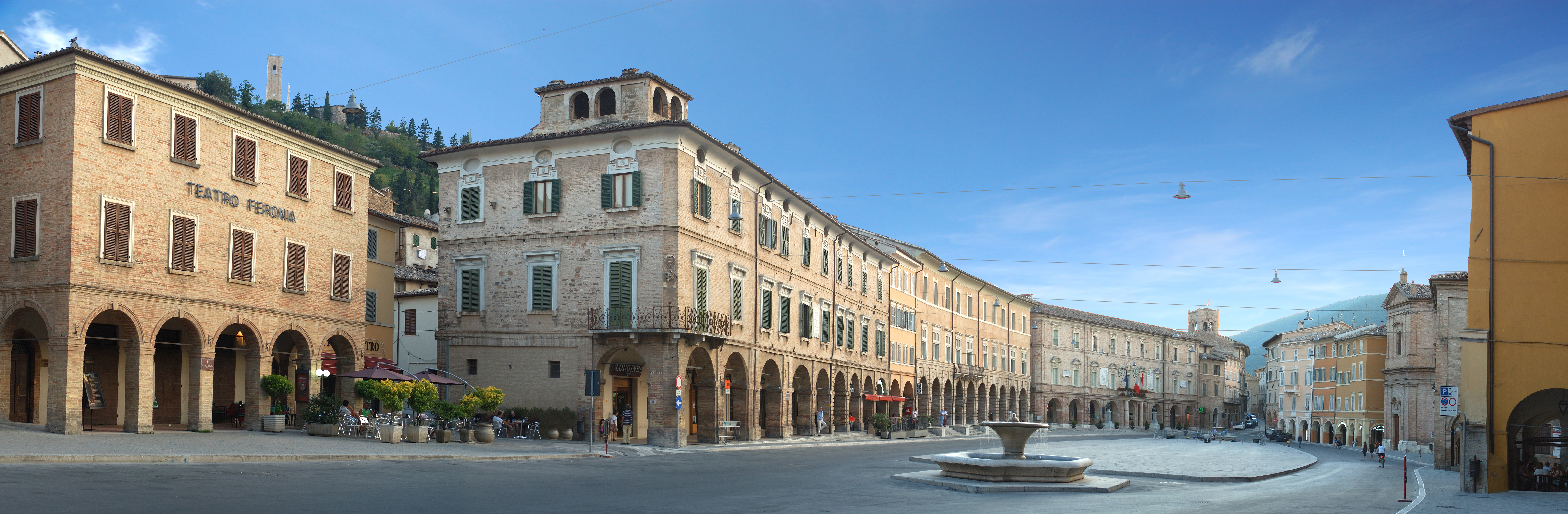 Piazza del Popolo This is a photo of a monument which is part of cultural heritage of Italy.